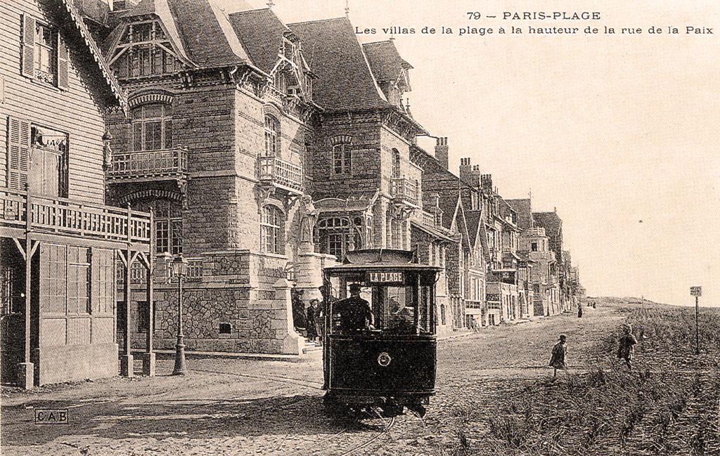 Le tramway du Touquet-Paris-Plage - Automotrice Campagne à essence sur le boulevard de la Plage.